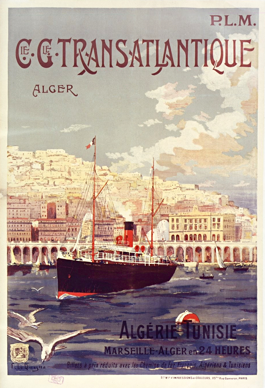 Affiche PLM Algérie Tunisie, 1901. Illustration de Fernand Le Quesne (1856-1932). P.L.M., C[ompagn]ie G[énéra]le Transatlantique, Alger. Algérie, Tunisie. Marseille - Alger en 24 heures. Billets à prix réduits avec les Chemins de Fer Français, Algériens & Tunisiens. : [affiche] / F. Le Quesne, 1901.